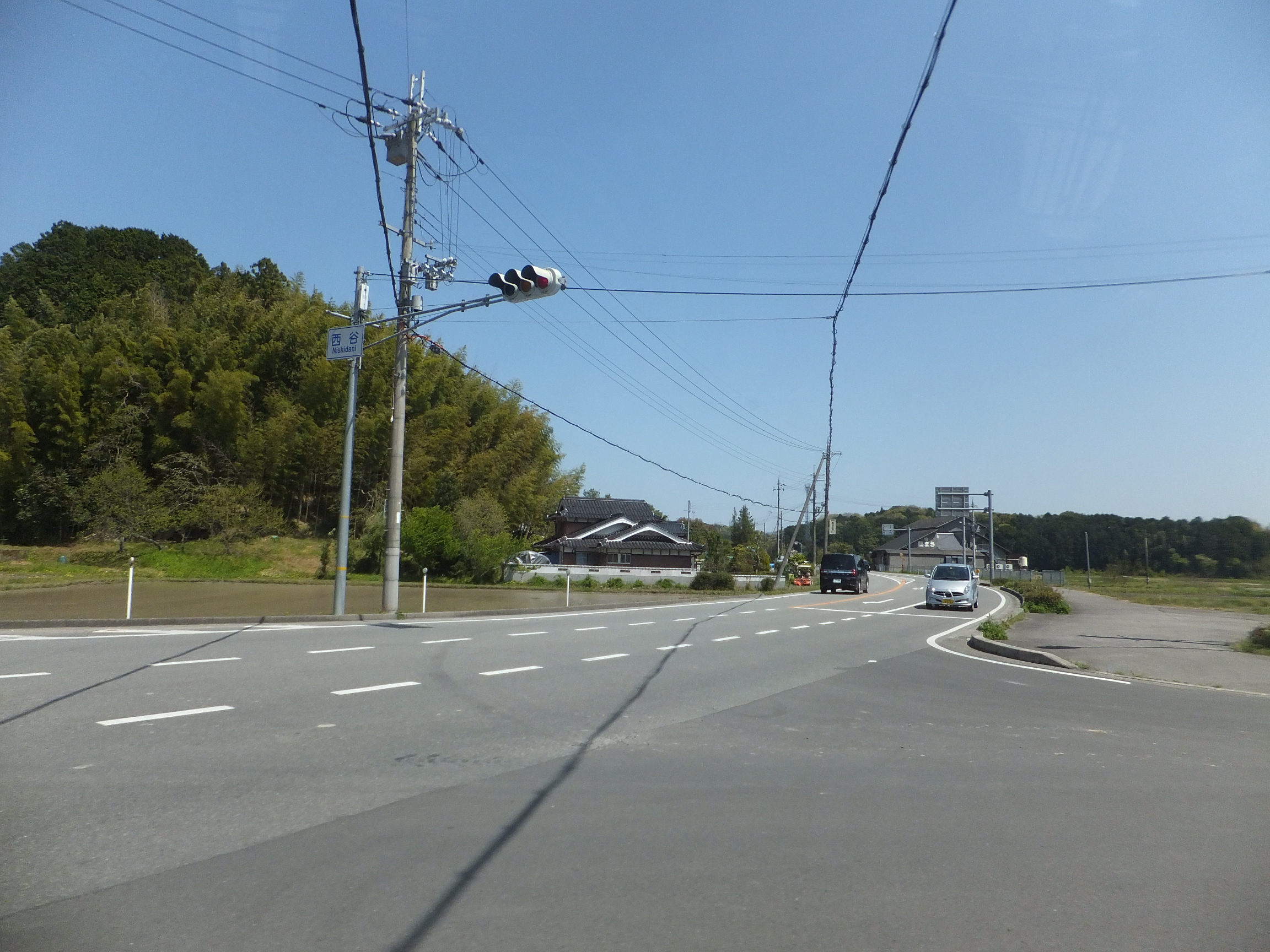 兵庫県篠山市西谷 兵庫県道140号長安寺篠山線